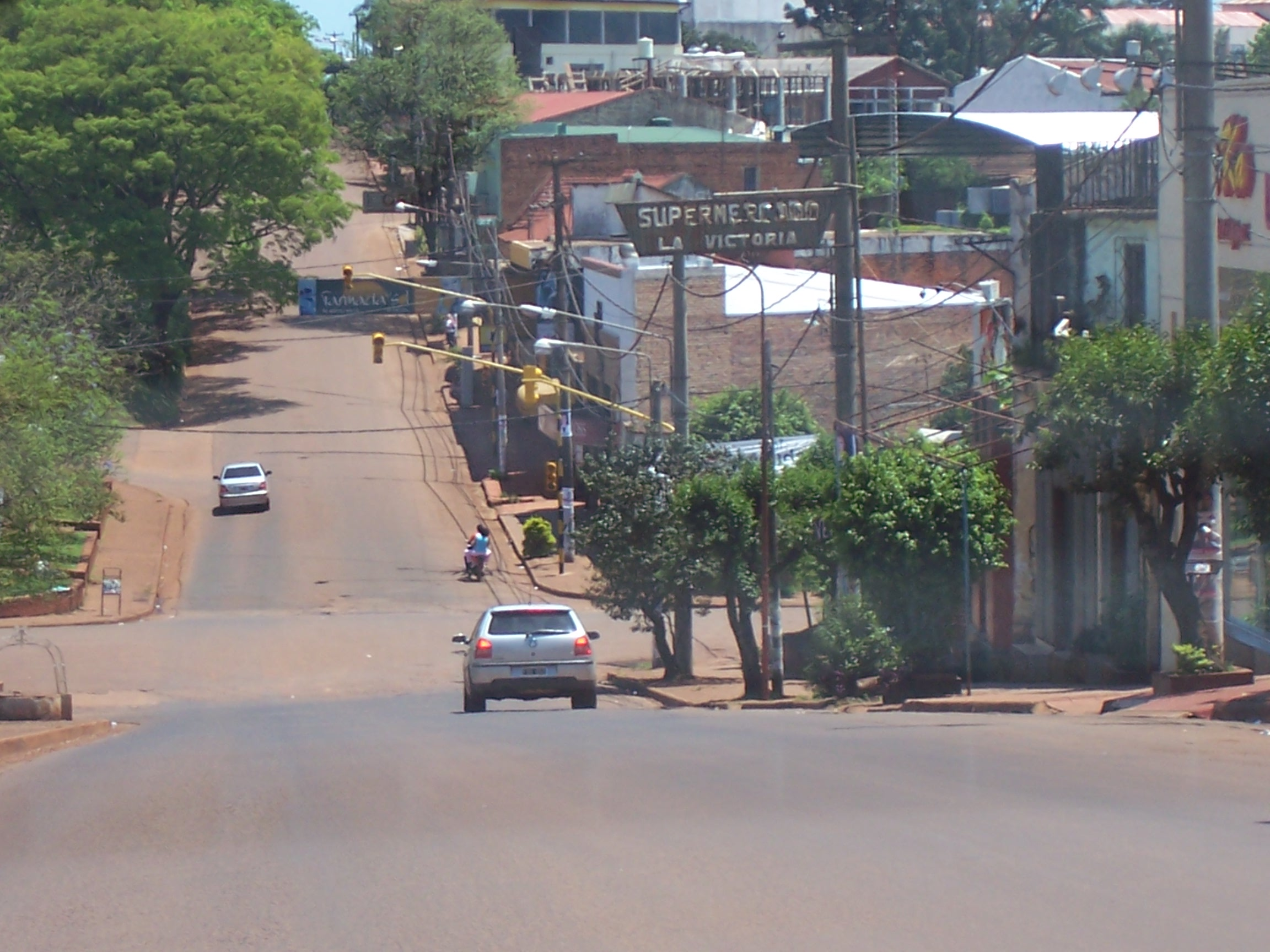 Foto de la Avenida Libertad, en dirección al centro de Oberá, Misones, Argentina.